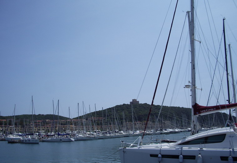 Porto di Punta Ala (GR)